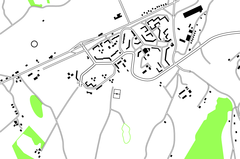 Plan du quartier de Planoise à Besançon réalisé à partir des cadastres de 1972.